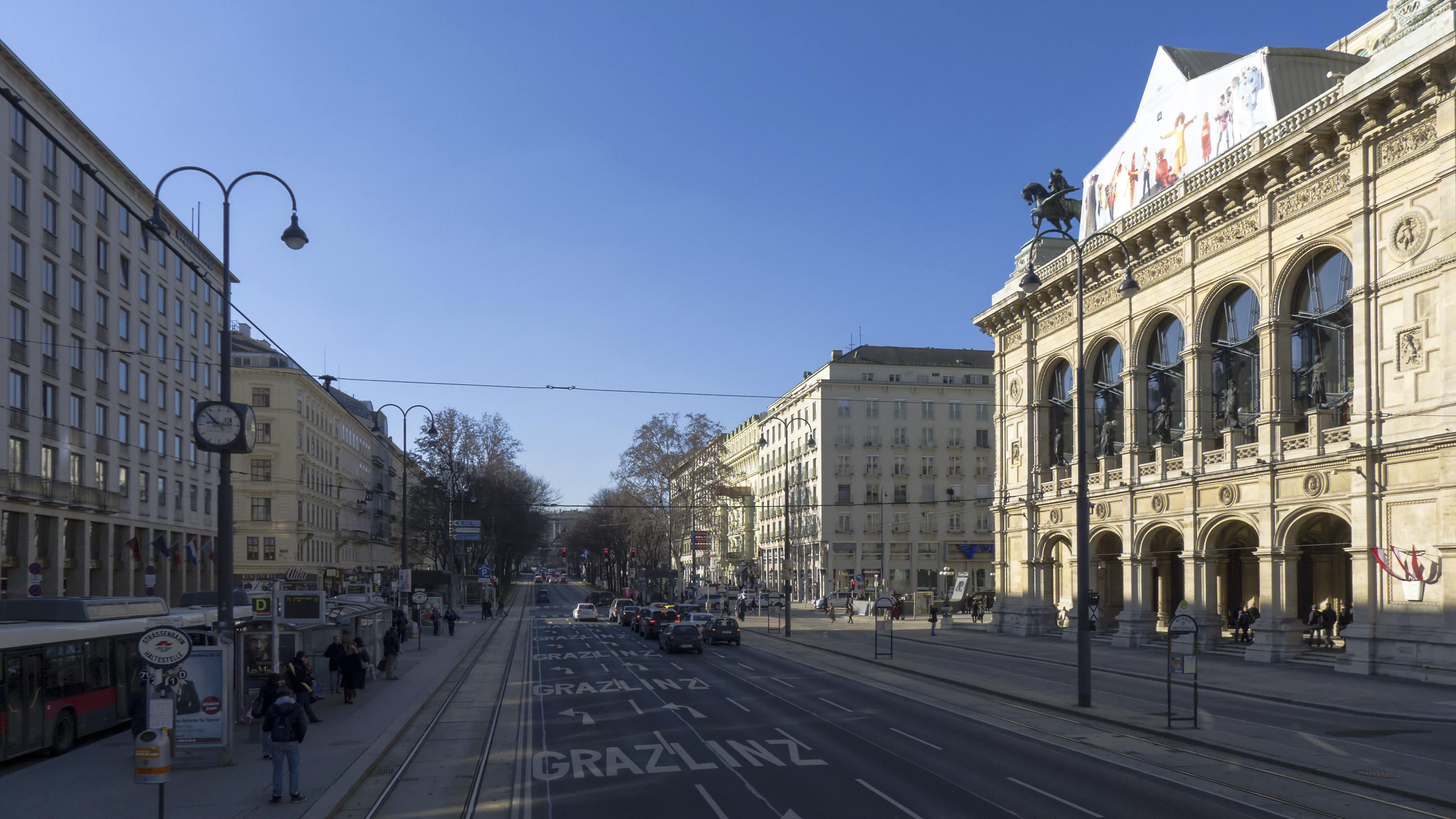 Opernring bei der Staatsoper Richtung Westen